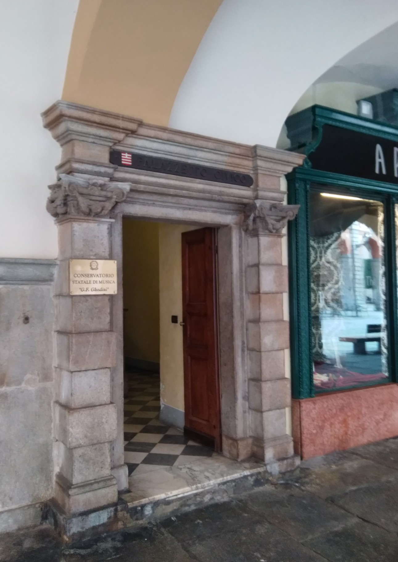 Conservatorio Ghedini Cuneo